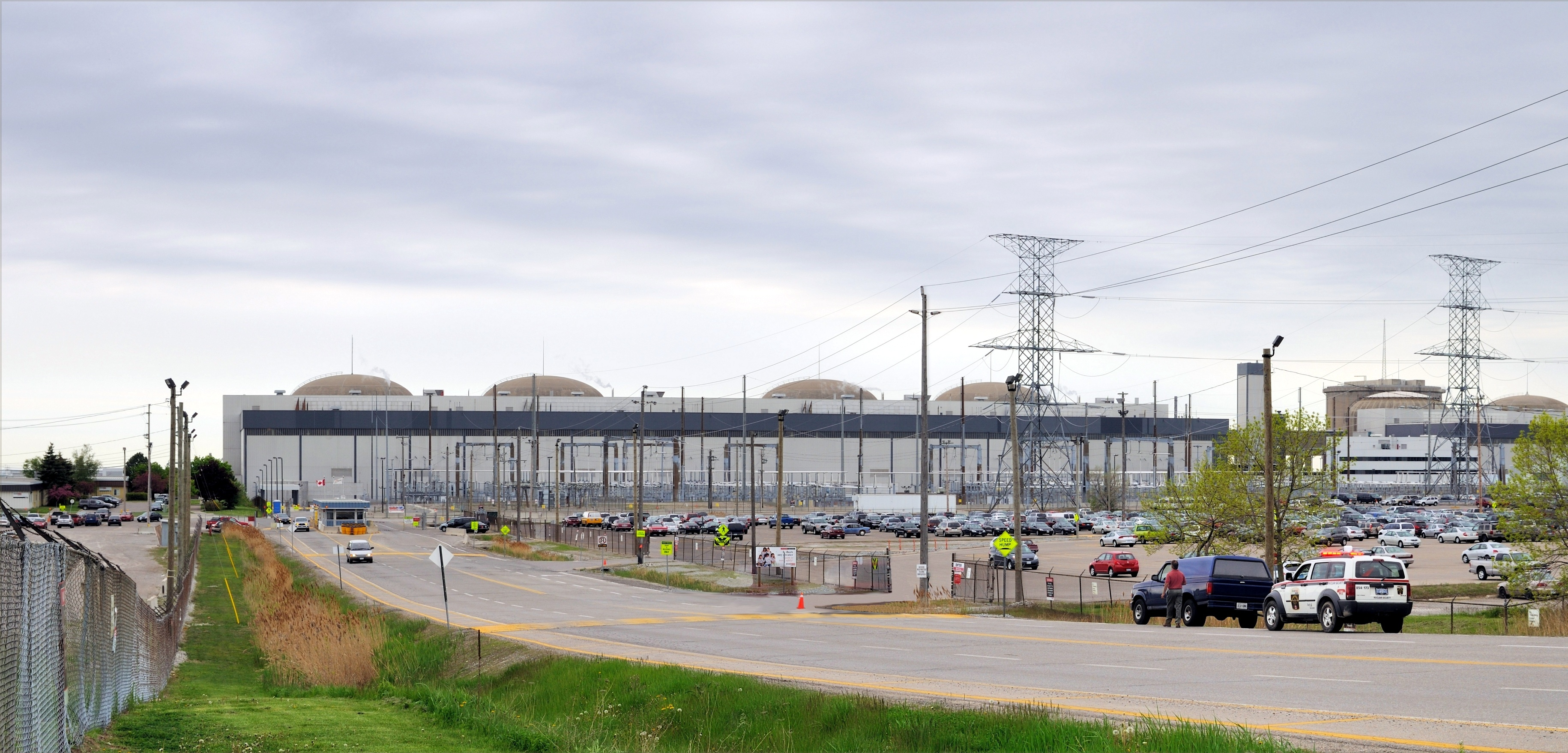 Kernkraftwerk Pickering, Ontario